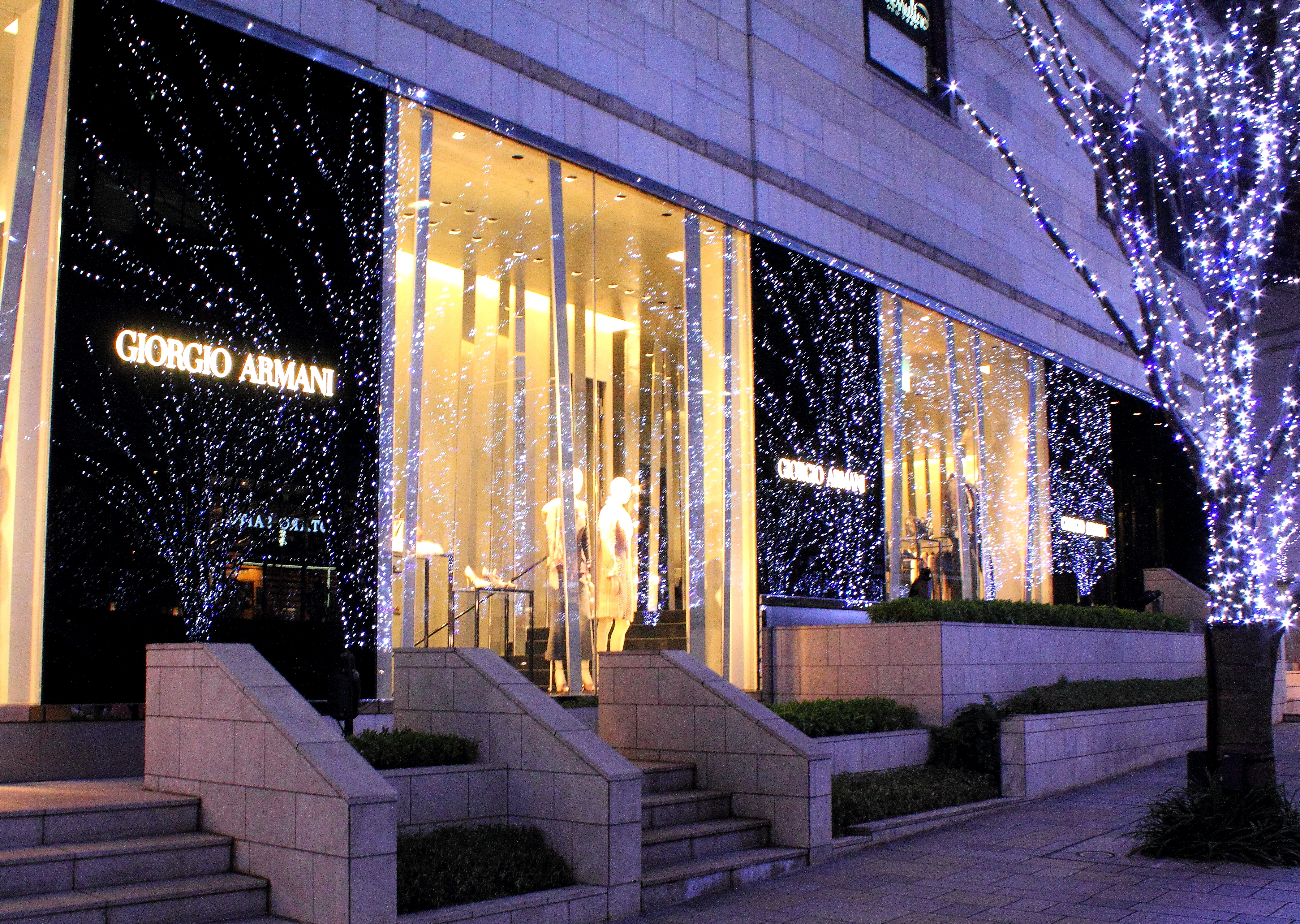 GIORGIO ARMANI 六本木ヒルズ店